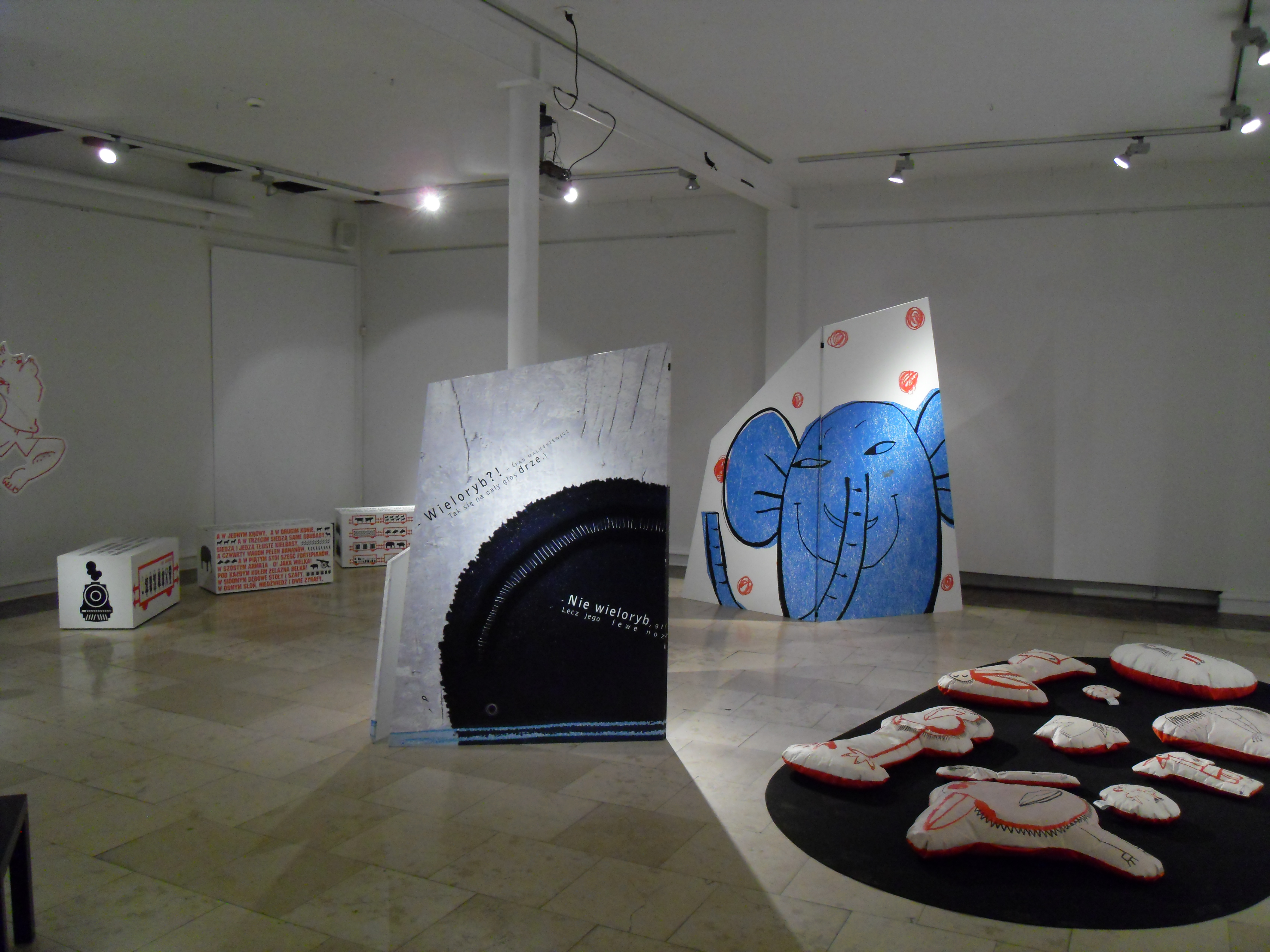 Galeria Nadbałtyckiego Centrum Kultury (w Ratuszu Starego Miasta) w Gdańsku, wystawa ilustracji do utworów Juliana Tuwima "Tu Tuwim".